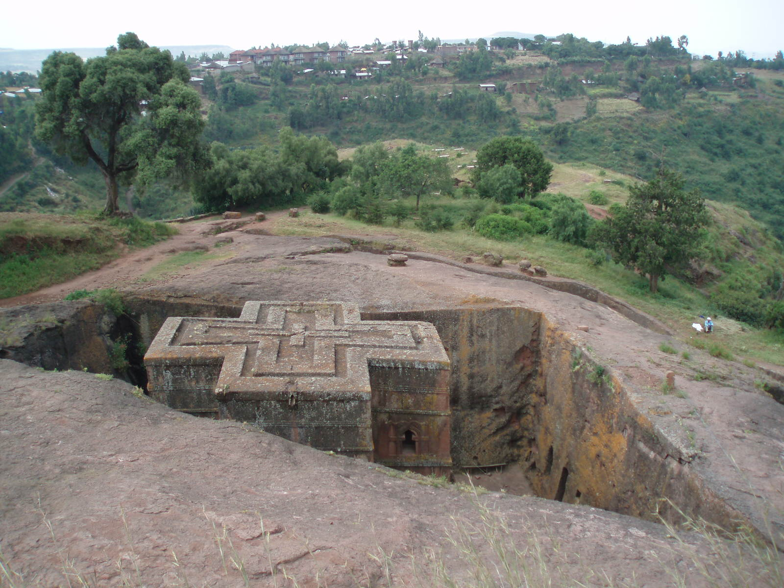 Église monolithe Bet Giyorgis (St-Georges) de Lalibela (Éthiopie)